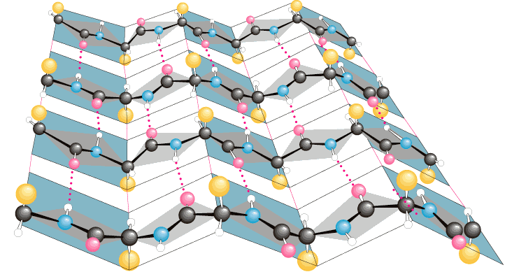 3D β-sheet proteins